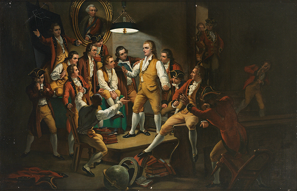 Schiller liest an geheimem Ort seinen Freunden aus den Räubern vor, während sich die Häscher des Herzogs nähern. Öl auf Lwd. 65 x 100 cm